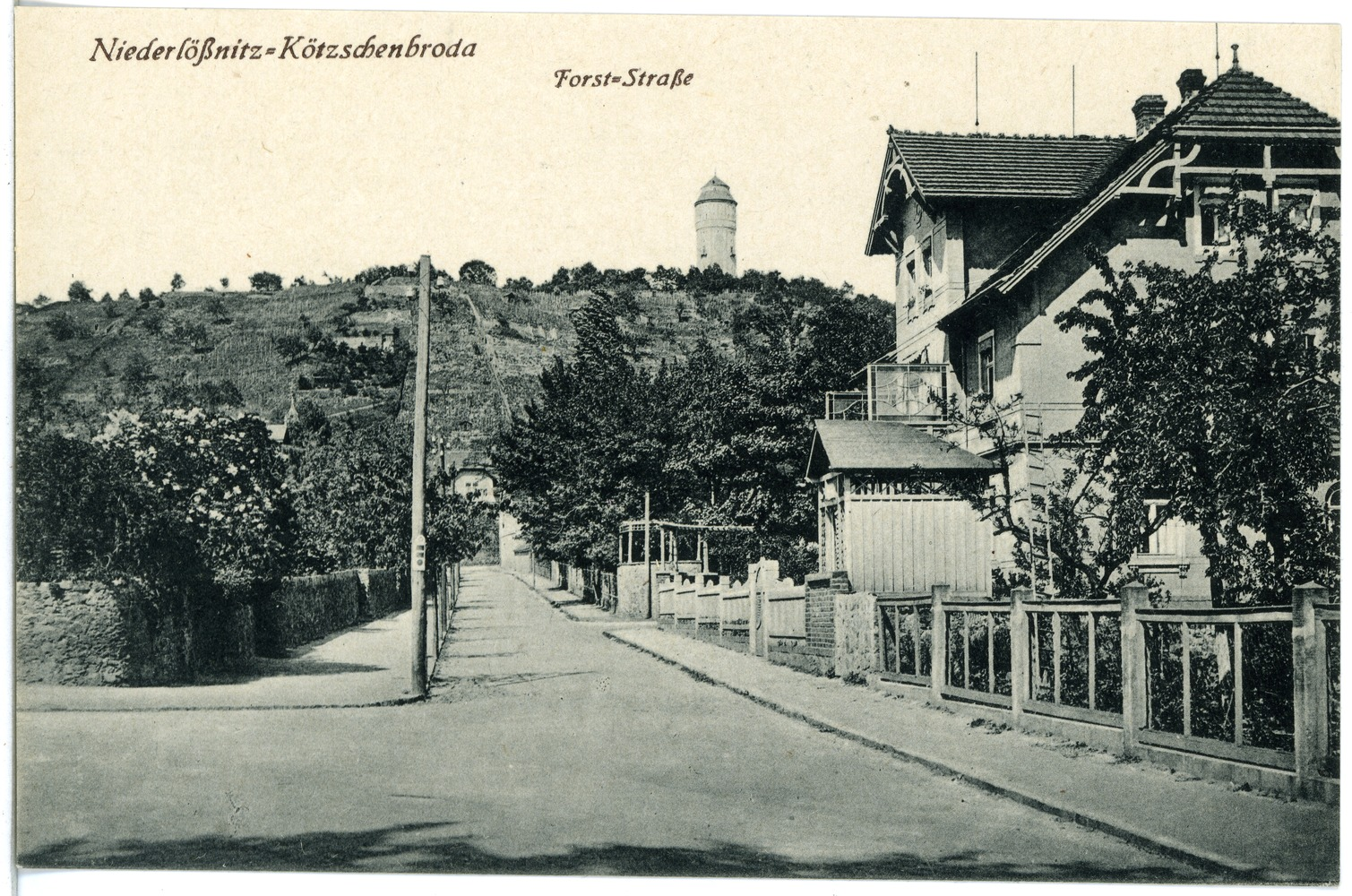 Radebeul; Forststraße - Niederlößnitz-Kötzschenbroda This postcard is from publisher Brück & Sohn in Meißen ( postcard has a unique number 20239 and is available in a higher resolution at the publisher. This images was uploaded in a cooperation project between Wikipedians and the publisher.